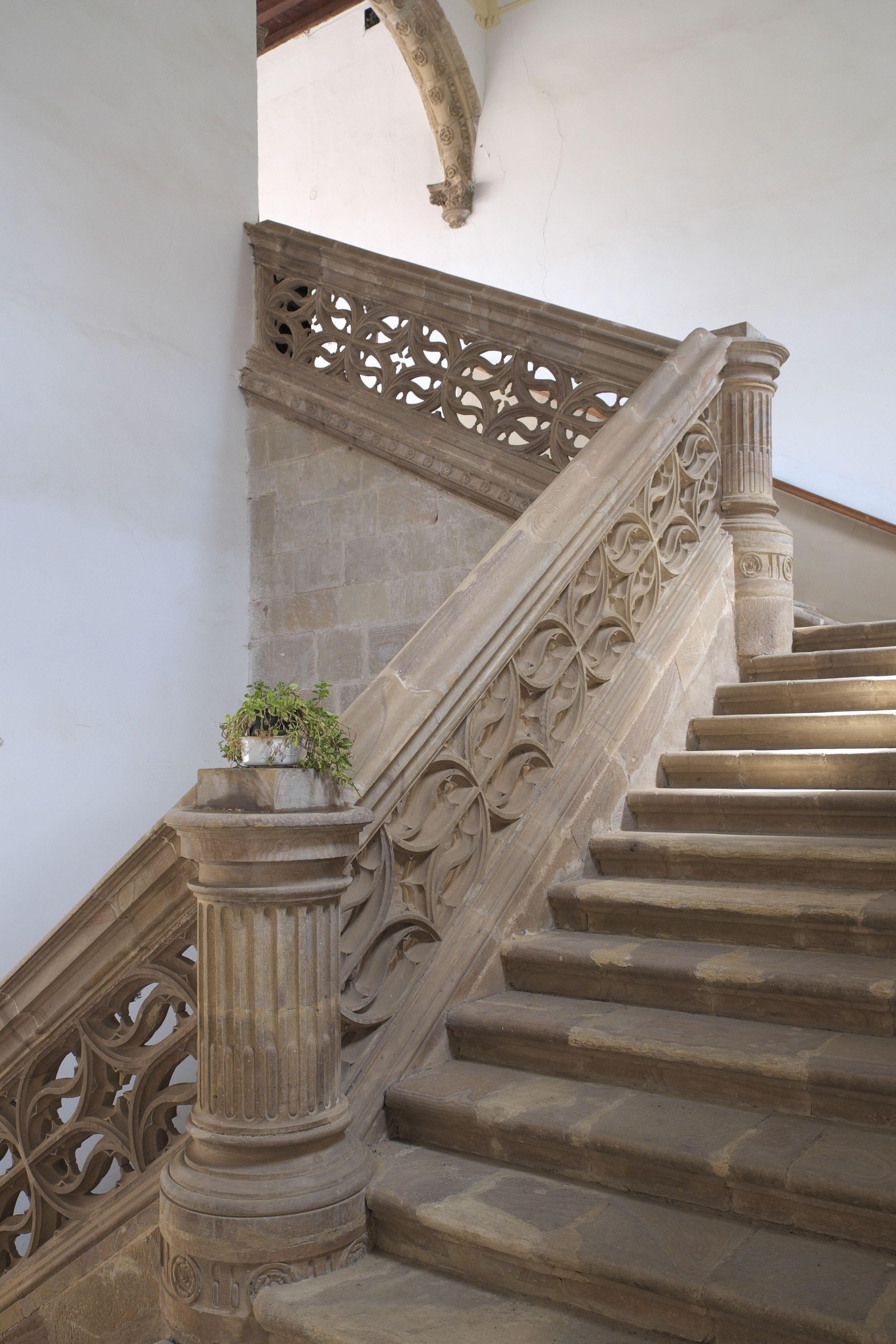 Ehemaliges Frauenkloster des Calatrava-Ordens, Convento de la Asunción (Mariä Himmelfahrt), in Almagro in der Provinz Ciudad Real (Kastilien-La Mancha/Spanien), Treppenhaus